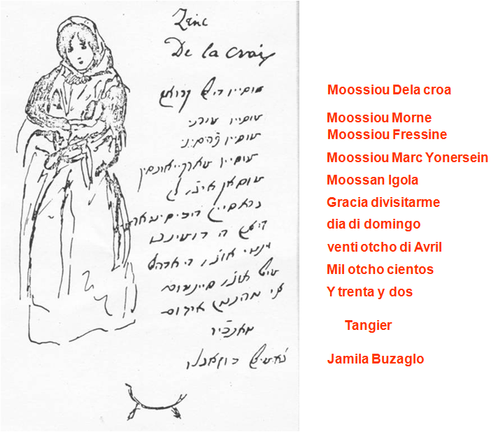 Jamila Buzaglo mensaje sobre dibujo de Eugene Delacroix, 1832 Los documentos en esta pagina, cortesía de Centre de la Culture Judéo-Marocaine. El mensaje de Jamila Buzaglo fue traducido por Jeffery Malka, .